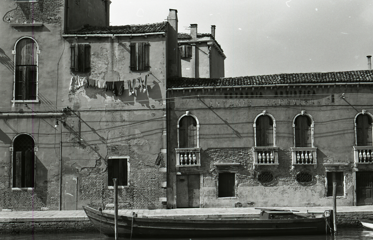 Servizio fotografico : Venezia, 1968 / Paolo Monti. - Strisce: 5, Fotogrammi complessivi: 27 : Negativo b/n, gelatina bromuro d'argento/ pellicola ; 35 mm. - ((I fotogrammi hanno una doppia numerazione. . - Sul portanegativi: Nikon Agfa 21. - Sul dorso del portanegativi Monti specifica: "Porte e finestre". - Probabilmente questa specifica in penna biro rossa si riferisce a ricerche personali che esulano dal contesto del servizio commissionato da Electa. - Occasione: Pubblicazione: "Edoardo ARSLAN, Venezia gotica: architettura civile gotica veneziana, Milano, Electa, 1970". - Fonte: Agenda di Paolo Monti: Venezia Architettura Gotica Civile / Ed. Electa maggio/giugno 1968 (1968/05-1968/06), presso Archivio Paolo Monti